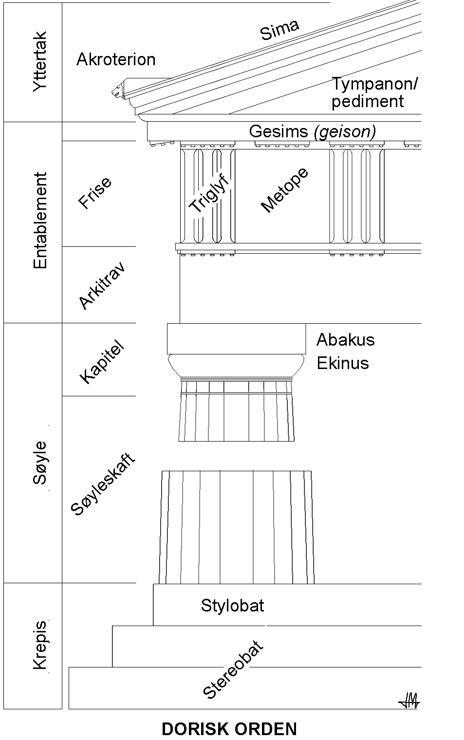 Modification of Soyleorden dorisk.png, correct term in Norwegian